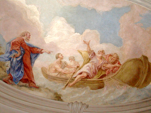 Fresko von Antonio Galli da Bibiena unter der Orgelempore der Peterskirche in Wien. Aus dem Leben des hl. Petrus: Jesus befiehlt Petrus, über das Meer zu gehen